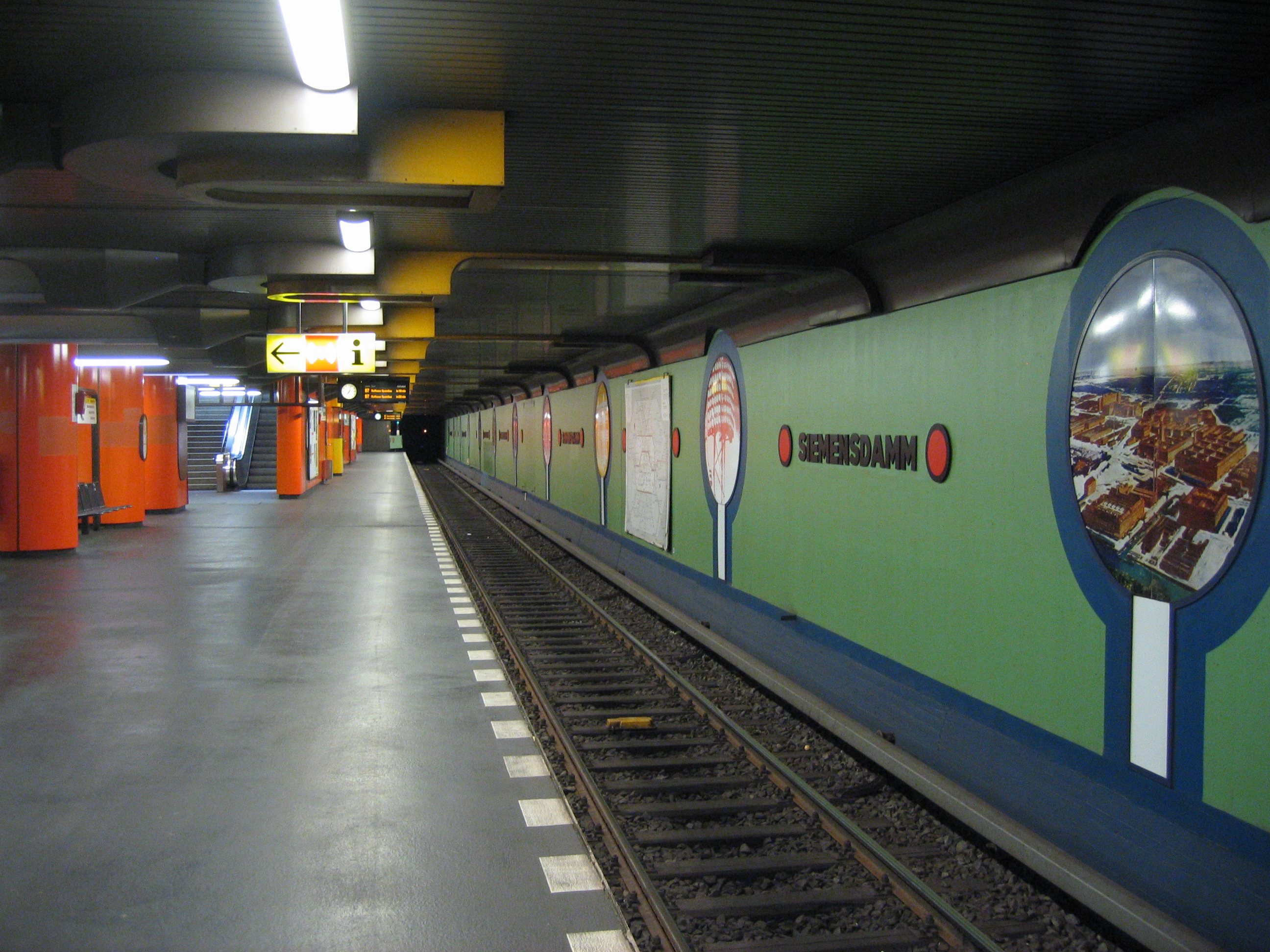 U-Bahnhof Siemensdamm, Berlin